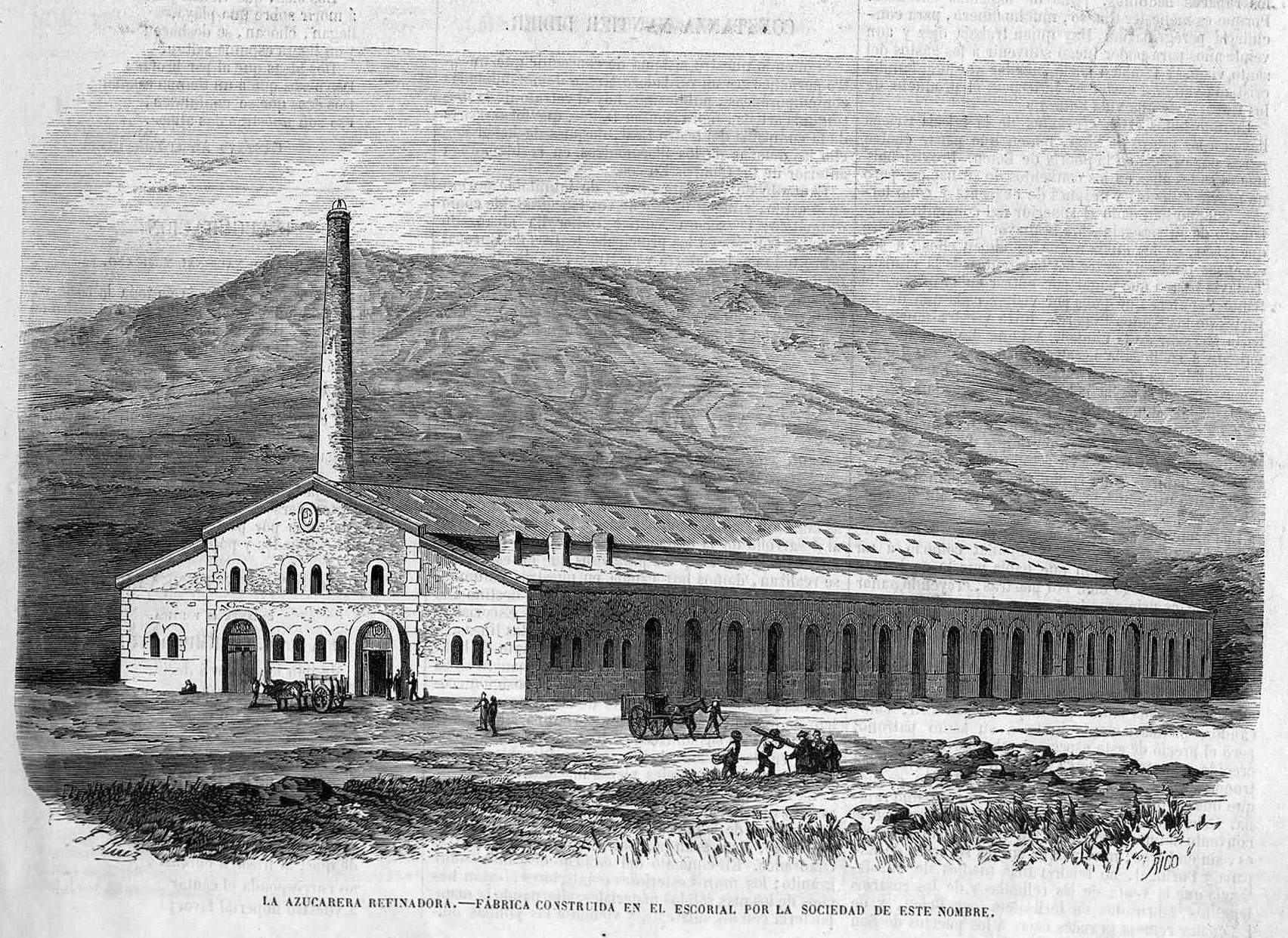 La azucarera refinadora, fábrica construida en El Escorial por la sociedad de este nombre, en la revista española El Museo Universal.